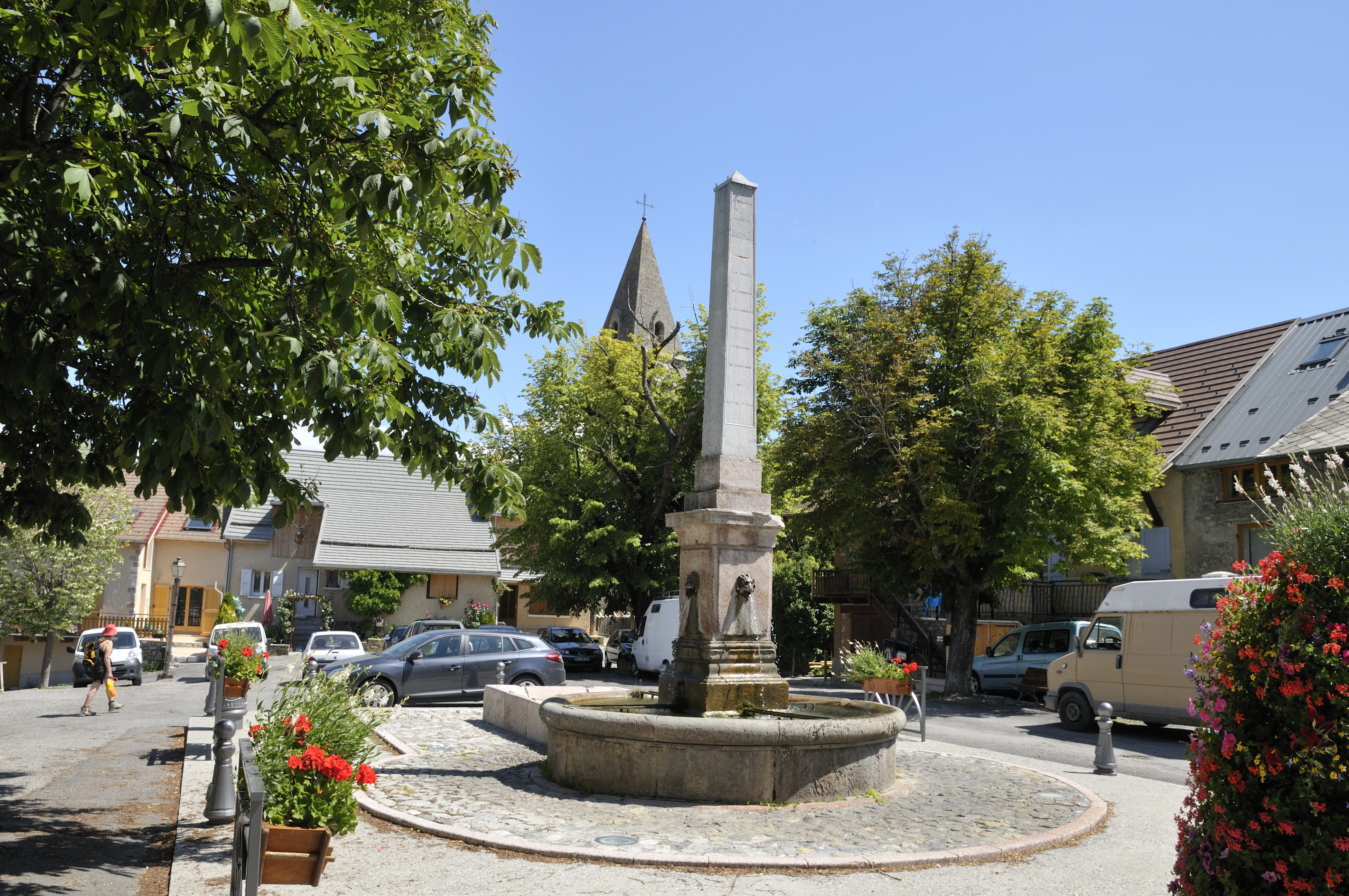 place du fort